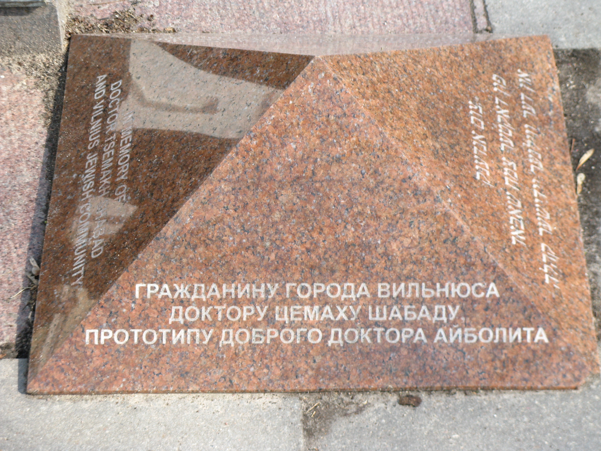 Камень у памятника Цемаху Шабаду.